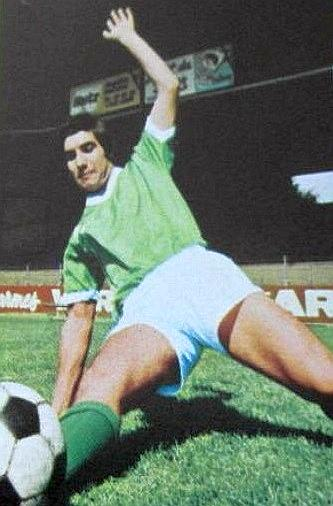 Pierre Repellini en 1971, 'Ageducatifs Football 1971 - 1972', figurina Panini.